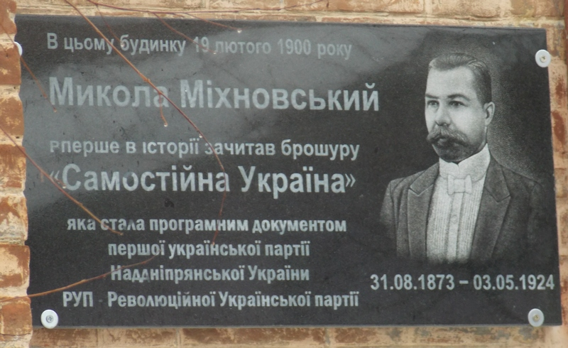 Пам'ятна дошка на місці першого проголошення нацпрограми РУП "Самостійна Україна". Полтава, Вознесенський узвіз 3